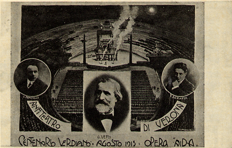 Cartolina del centenario Verdiano (1913) a Verona